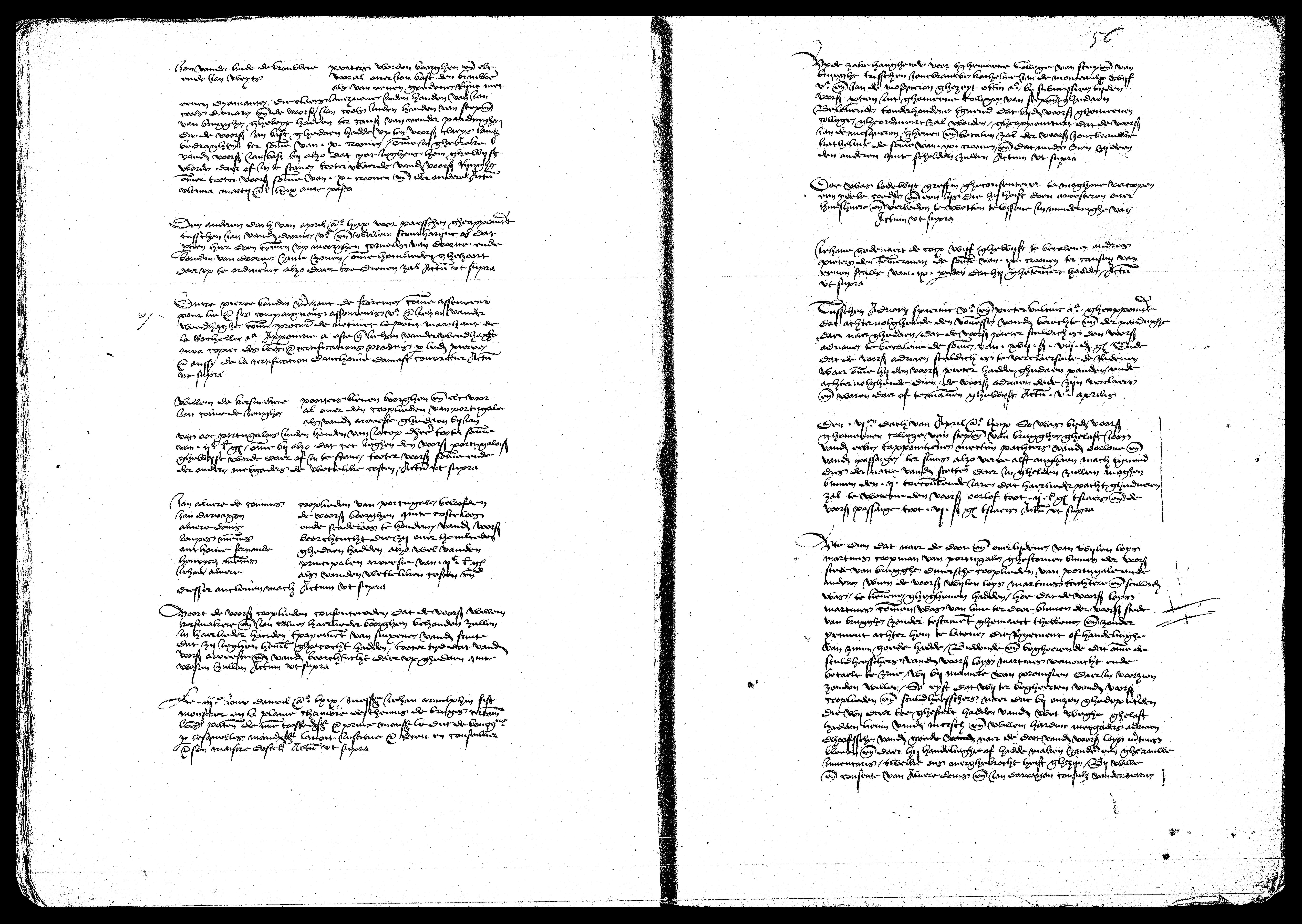 "Willem De Kersmakere et Jan Colve de Jonghe se portent cautions des marchands de Portugal (João Álvares ‘de Comines’, João de Aragão, Álvaro Dinis, Lopo Mendes, António Fernandes, Henrique Mendes et João Álvares) dans l’arrêt fait par João Vaz. Ces marchands certifient que leurs cautions ne subiront pas de dommages; Willem De Kersmakere en Jan Colve de Jonghe, poorters, bleven boorghen ende elk voor al over den cooplieden van Portugale, als vanden arreeste ghedaen bij Jan Vas, ooc portugalois,inden handen van Jacop dHeere tooter somme van .ijc. £ gr, omme bij alzo dat yet jeghen den voors. Portugaloisen ghewijst worde daer of in te stane, tooners voors.. somme ende der ondere metgaders de wettelijke costen. Actum ut supra (den andren dach van april anno lxix voor Paesschen). De cooplieden van Portugale beloofden de voors. boorghen quite, costeloos ende scadeloos te houdene vanden voors. boorchtucht die zij over hemlieden ghedaen hadden, alzo wel vanden principalen arreeste van .ijc. £ gr. als vanden wetteliken costen ende diesser ancleven mach. Actum ut supra. Voort de voors. cooplieden consenteirden coonsenteirden dat die voors. Willem De Kersmakere ende Jan Colve, haerlider boorghen, behouden zullen in haerlieder handen tpayement van Sinxene vanden fruite dat zij jeghen hemlieden ghecocht hadden, tooter tijd dat vanden voors. arreeste vander boorchtucht daer up gedaen quite wesen zullen. Actum ut supra."